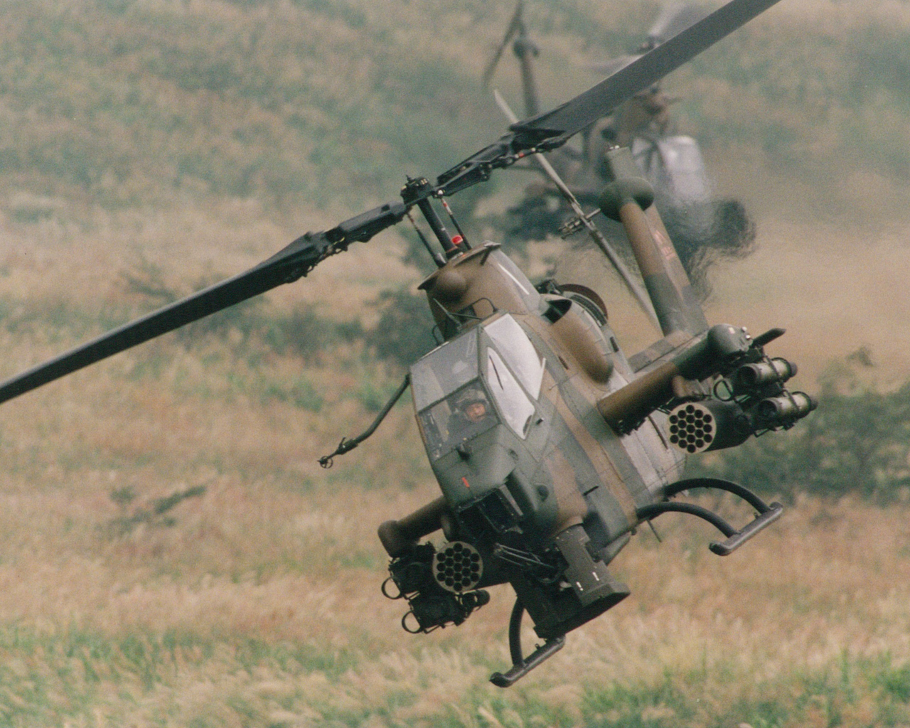 略称：AH-1S 愛称：コブラ [乗員]2人 ○機体 [全長]16.18m（胴13.59m） [全幅]13.41m（ウイングスパン幅 3.28m） [全高]4.19m [ローター直径]13.41m [製作]富士重工業 ○エンジン [名称]T53-K-703 [出力]1.134SHP（連続）×1 [製作]川崎重工業 [最大全備重量]4,536kg [最高速度]約260km/h [巡航速度]約230km/h [航続距離]約520km [実用上昇限度]約5,030m 武装は、対戦車ミサイル・トウ（TOW）と70ミリロケット弾、3銃身20ミリ機関砲を装備している。59年度国産初号機が納入されていた。